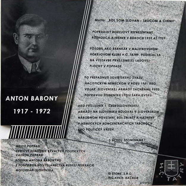 Pamätná tabuľa na Zimnom štadióne v Poprade